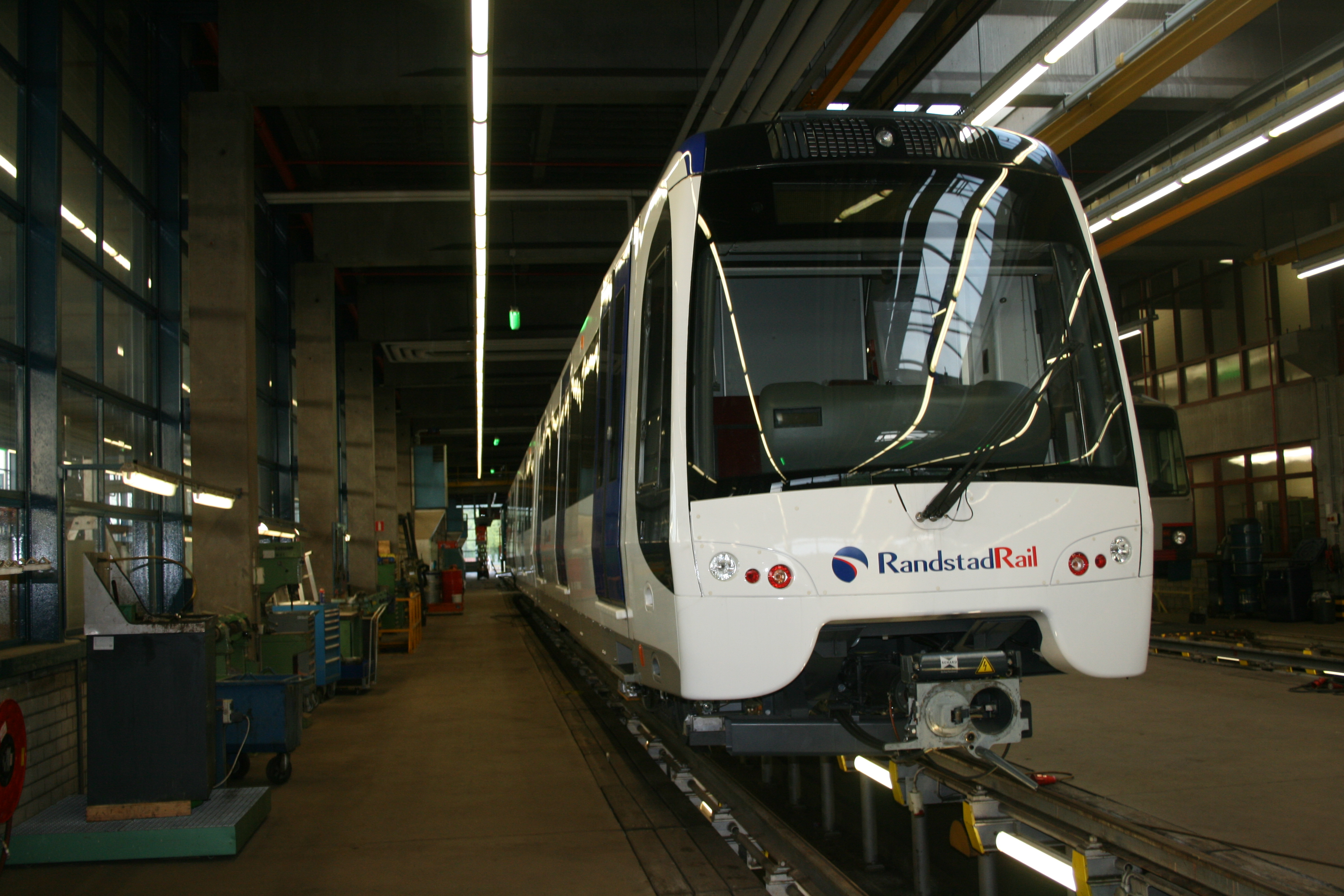 De nieuwste metro van de RET, de RSG3. Deze metro zal in het najaar van 2008 op RandstadRail komen te rijden.